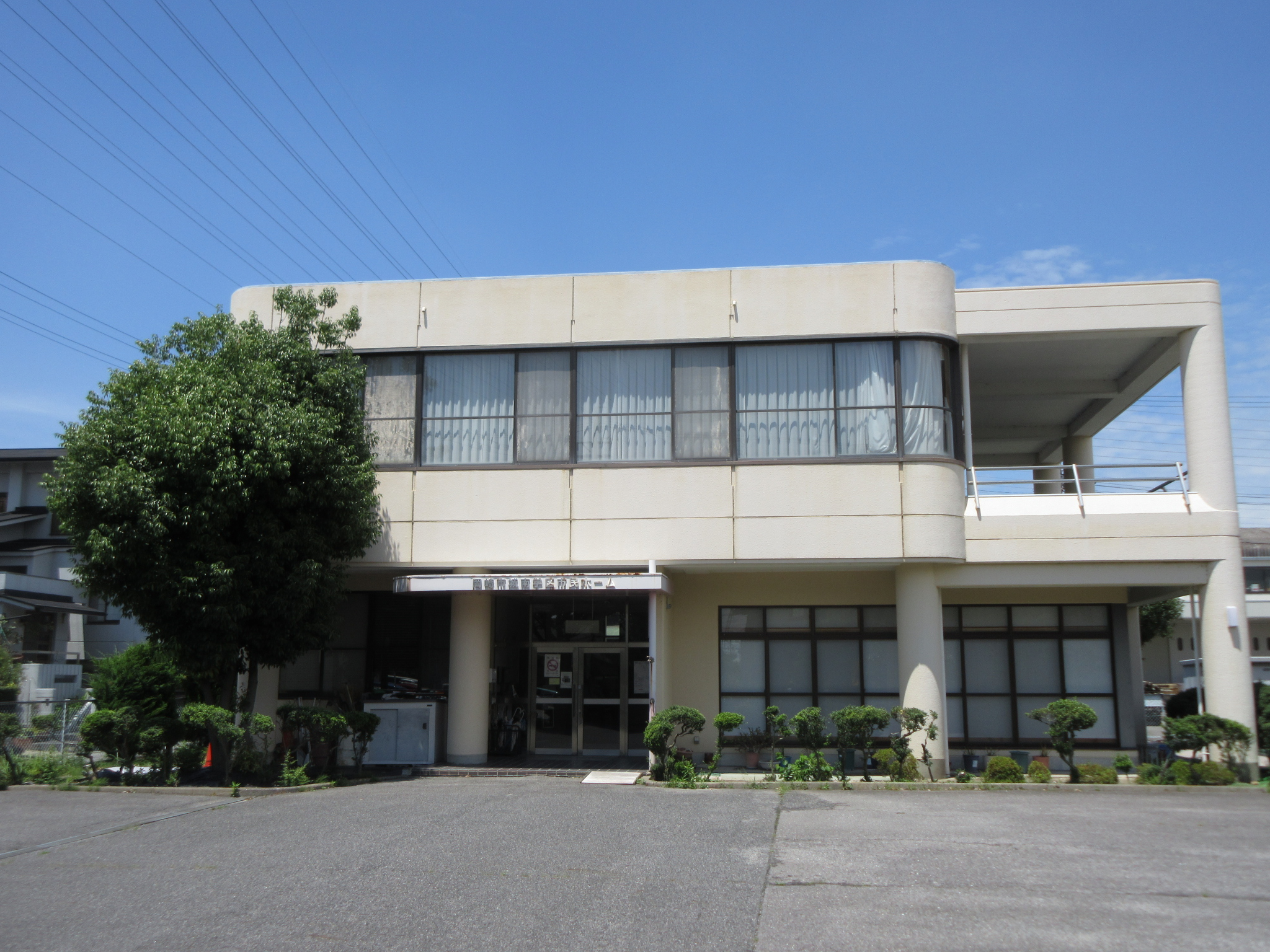 岡崎市城南学区市民ホーム